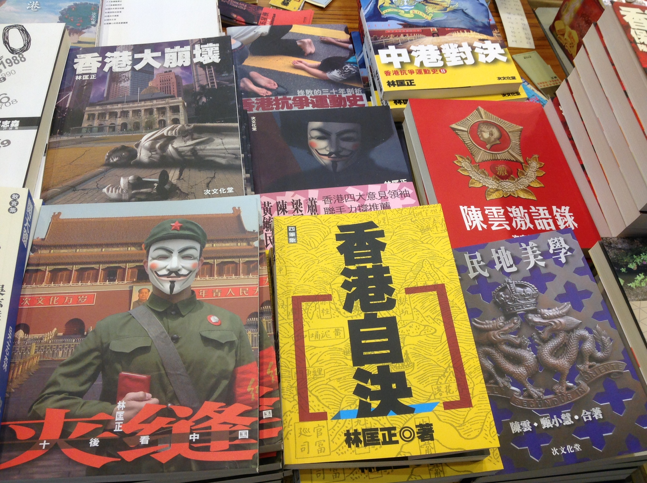 香港近年興起港獨思潮（美國之音圖片）